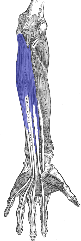 Flexor-digitorum-profundis